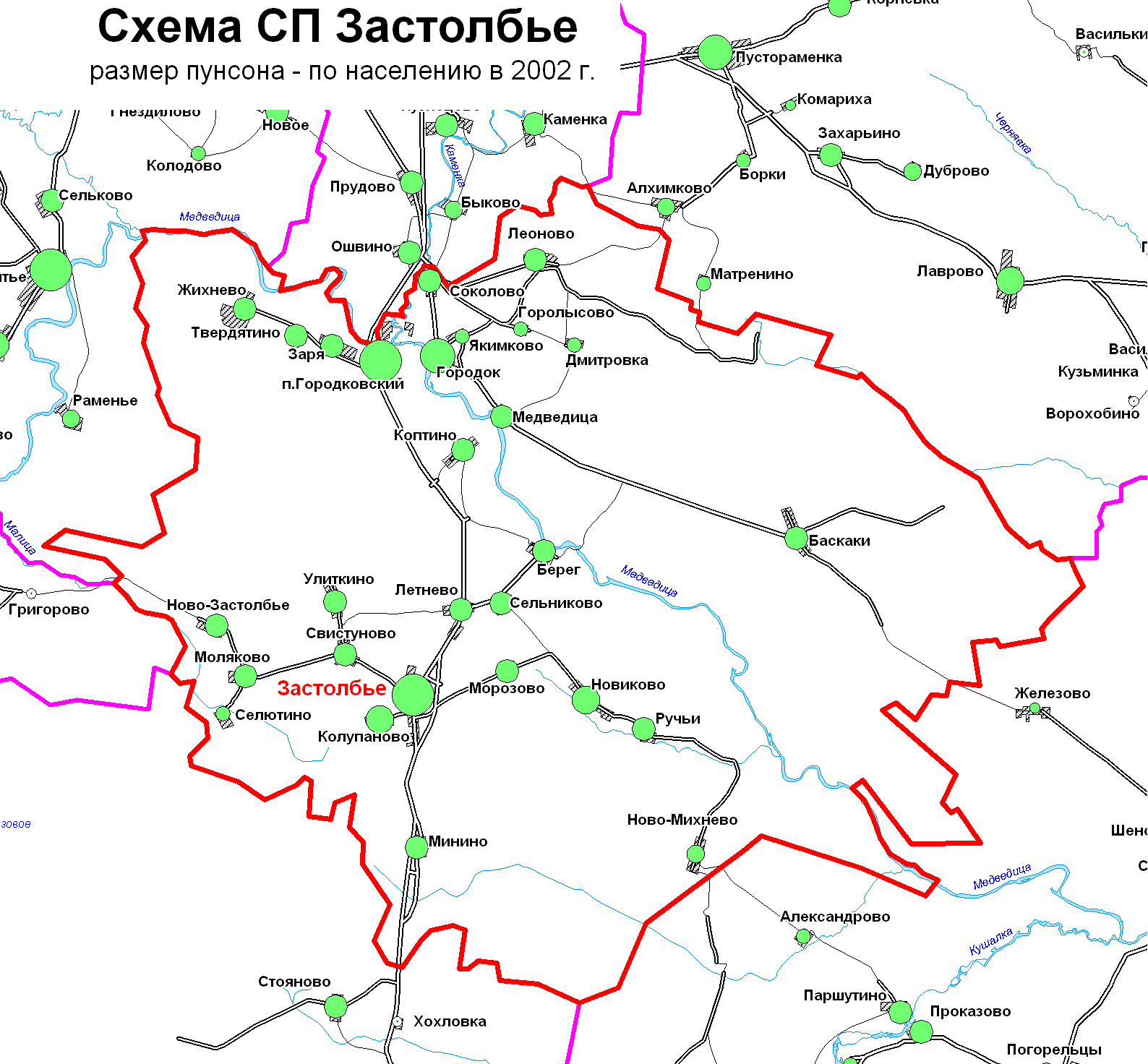 Схема сп Застолбье Тверской области